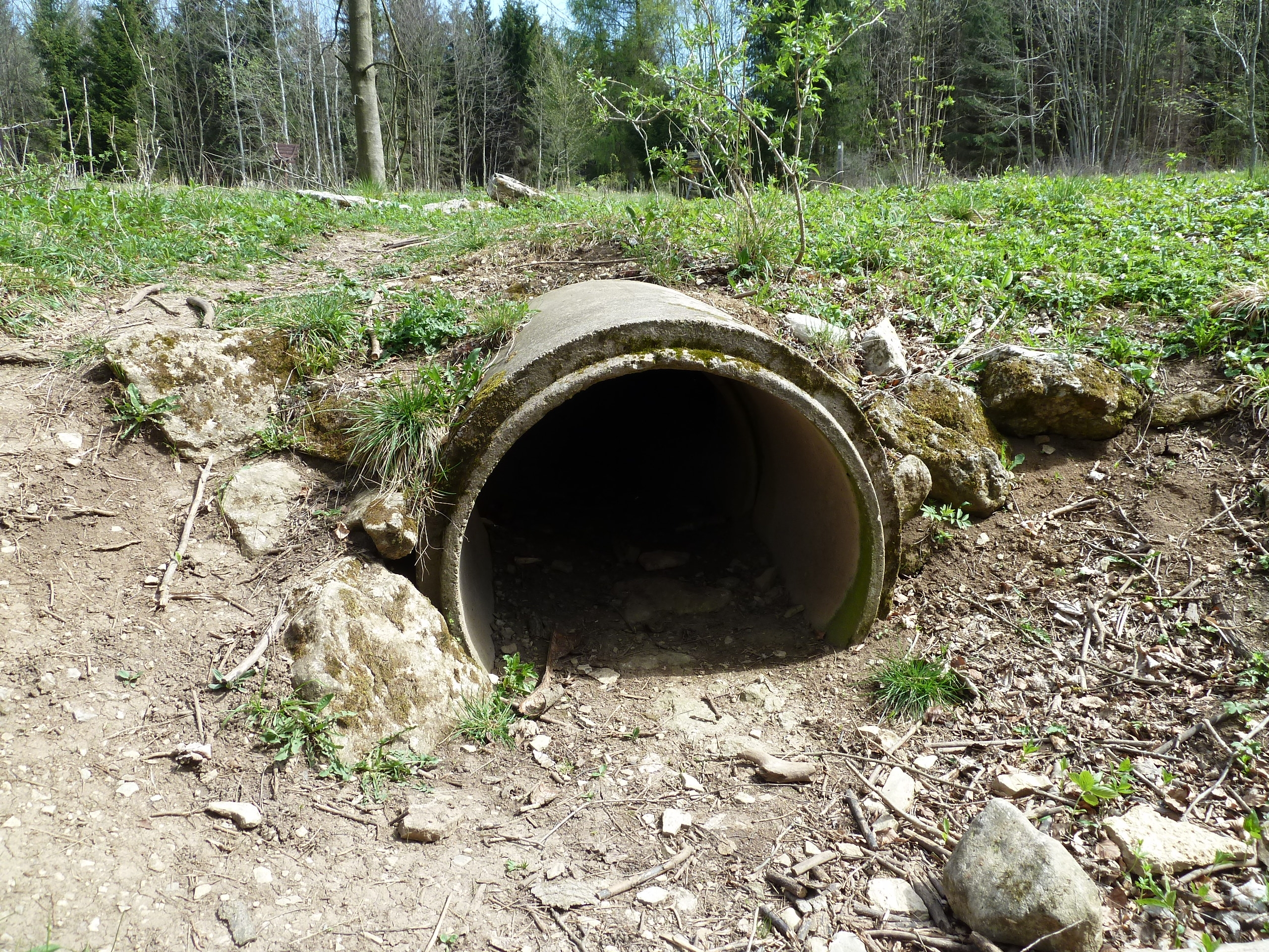 Röhre an der innerdeutschen Grenze auf der Gobert zum Schleusen von DDR-Spionen, Westeingang jenseits der Sperranlagen mit direktem Zugang zur Bundesrepublik.